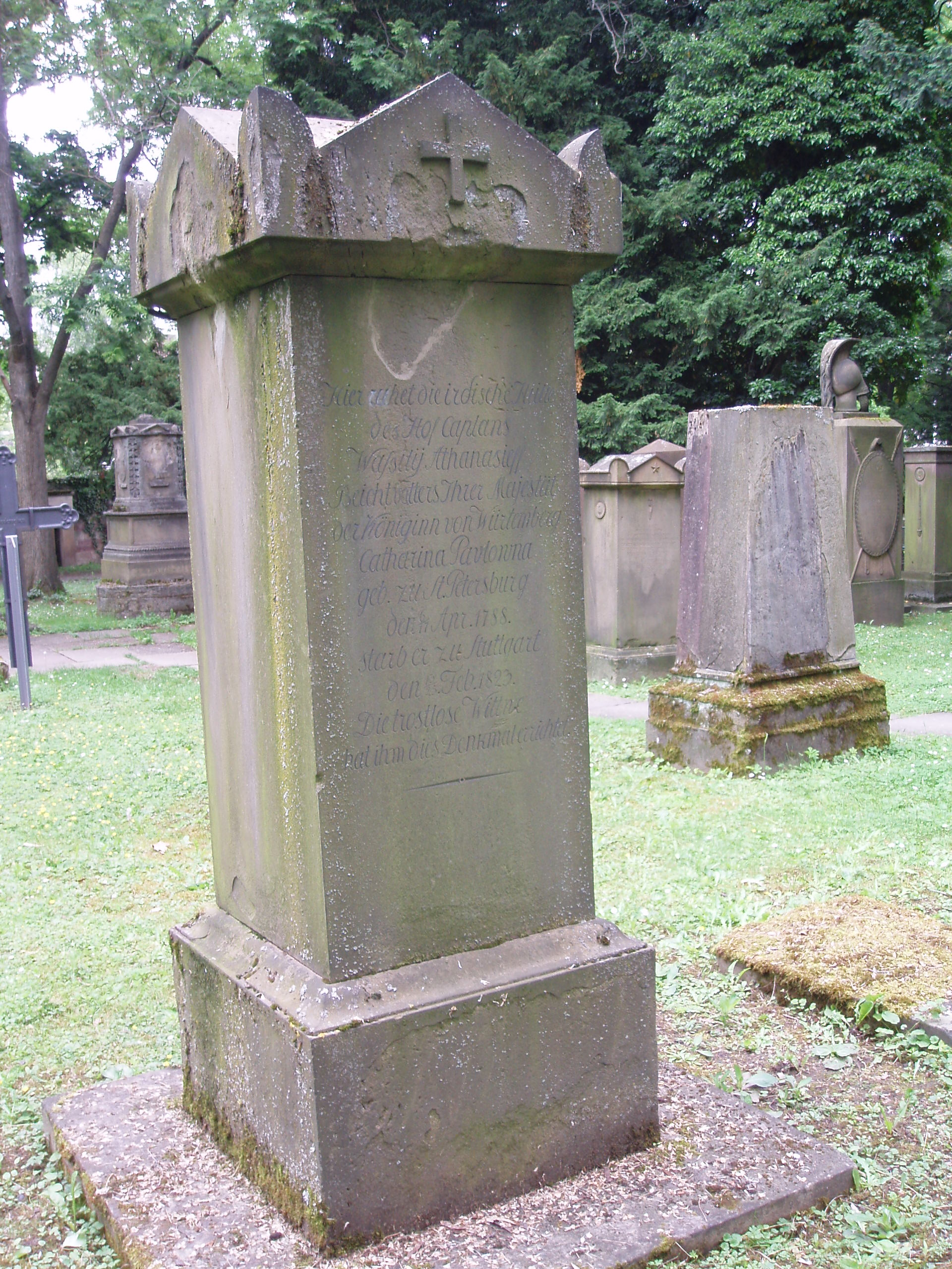 Grab des Hofkaplans und Beichtvaters der Katharina Pavlovna auf dem Hoppenlaufriedhof